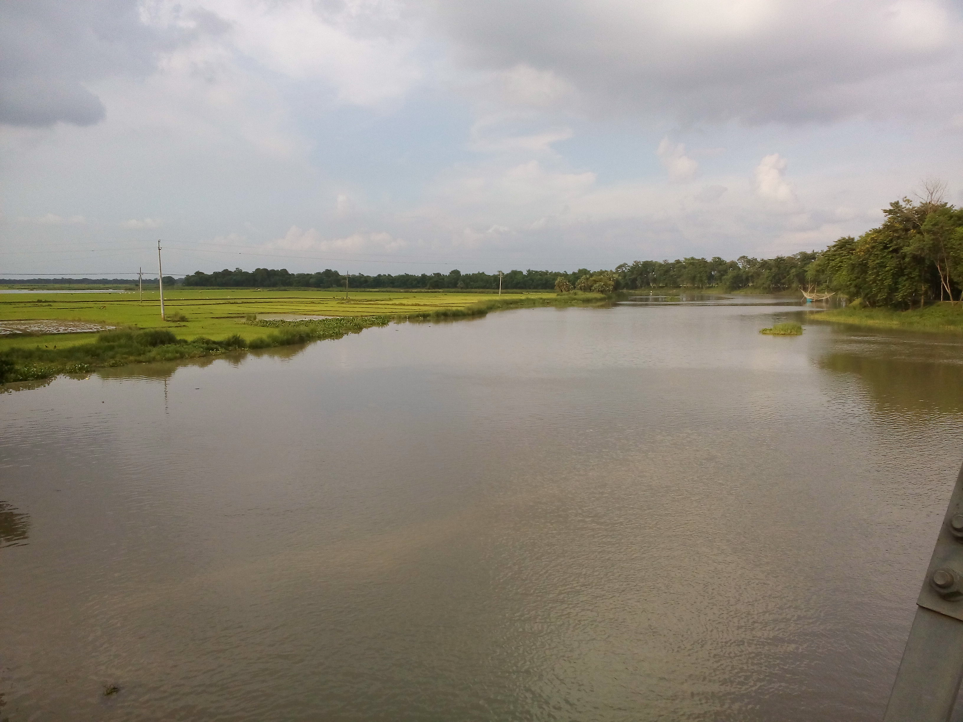 বুরুজ গ্রামে শিব নদীর উপর নির্মিত ব্রিজ থেকে তোলা এই ছবি